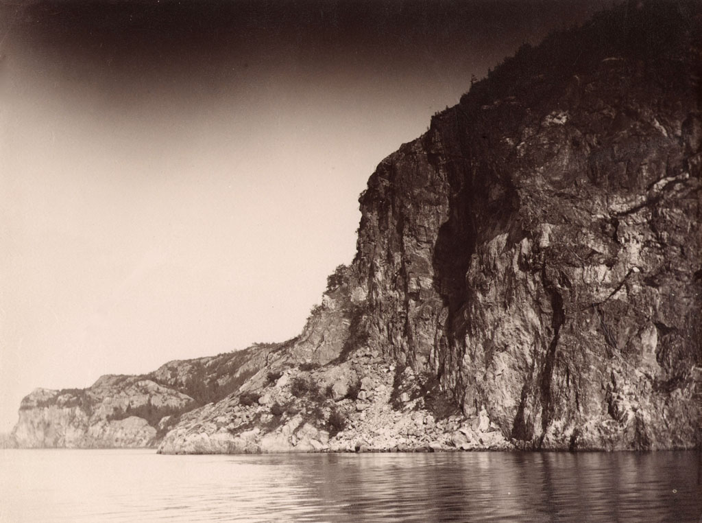 Smörkullen at Gullmarsberg by Gullmarsfjorden (Gullmaren Fjord). Smörkullen på Gullmarsberg vid Gullmarsfjorden. Parish (socken): Skredsvik Province (landskap): Bohuslän Municipality (kommun): Uddevalla County (län): Västra Götaland Photograph by: Carl Curman Date: 1880s Format: Albumen print Persistent URL: Read more about the photo database (in english)